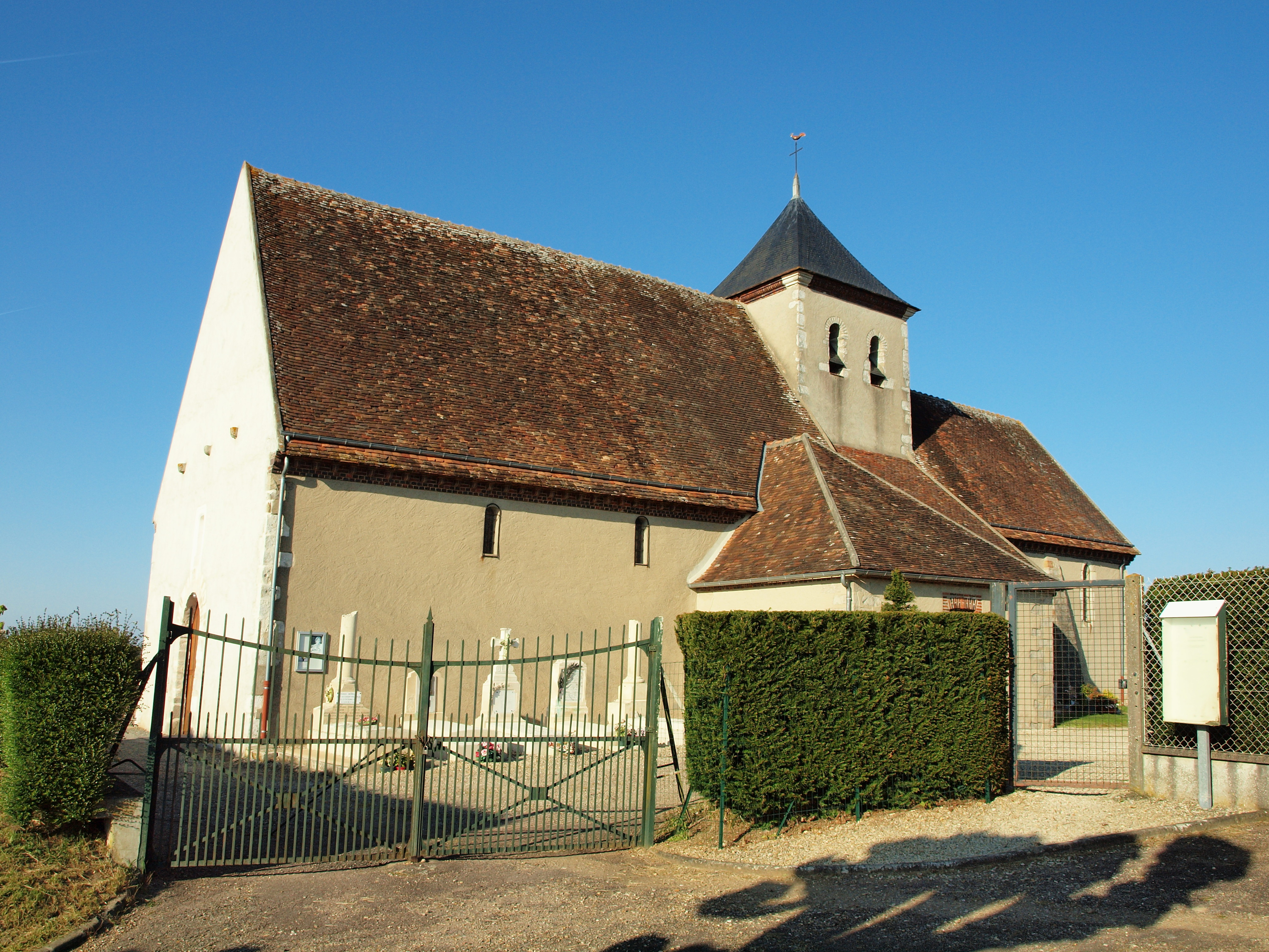 Église Notre-Dame-de-l'Assomption de Maillot (Yonne, France)